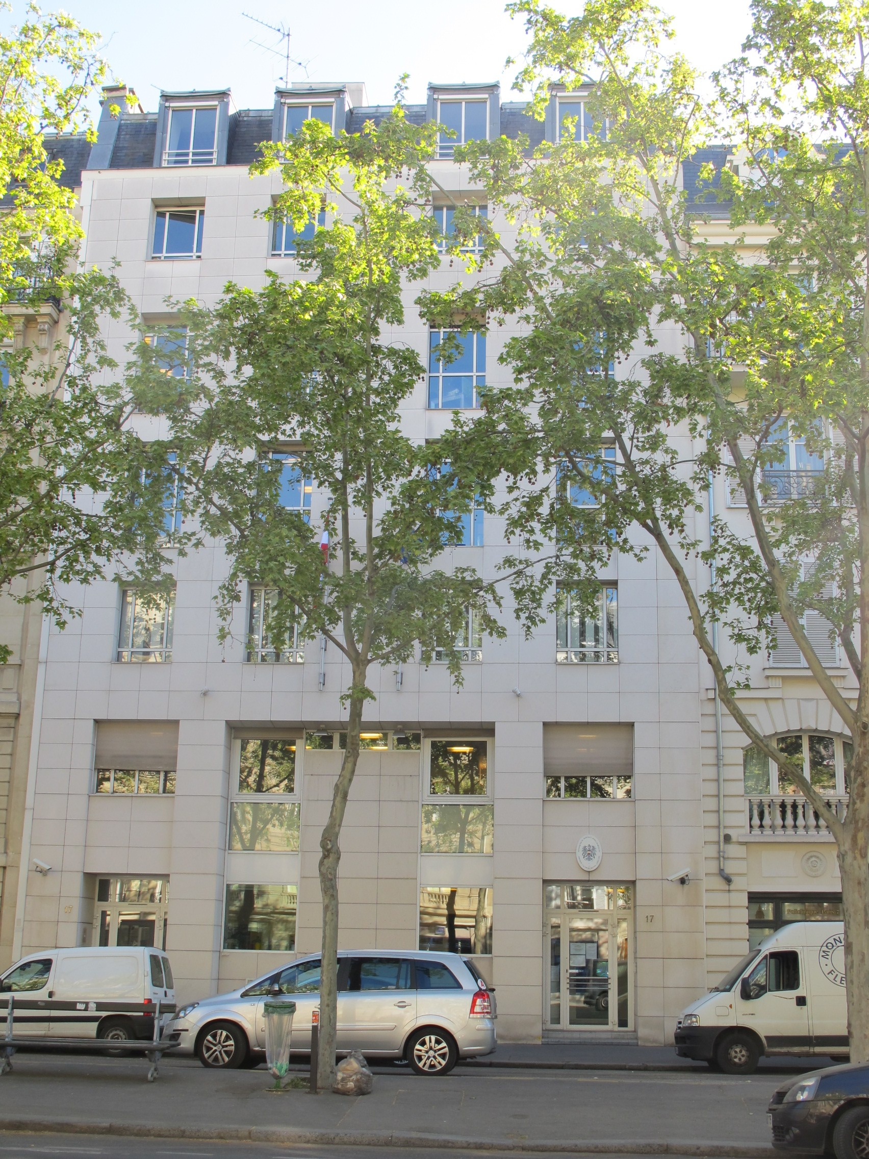 Rakouské kulturní fórum v Paříži